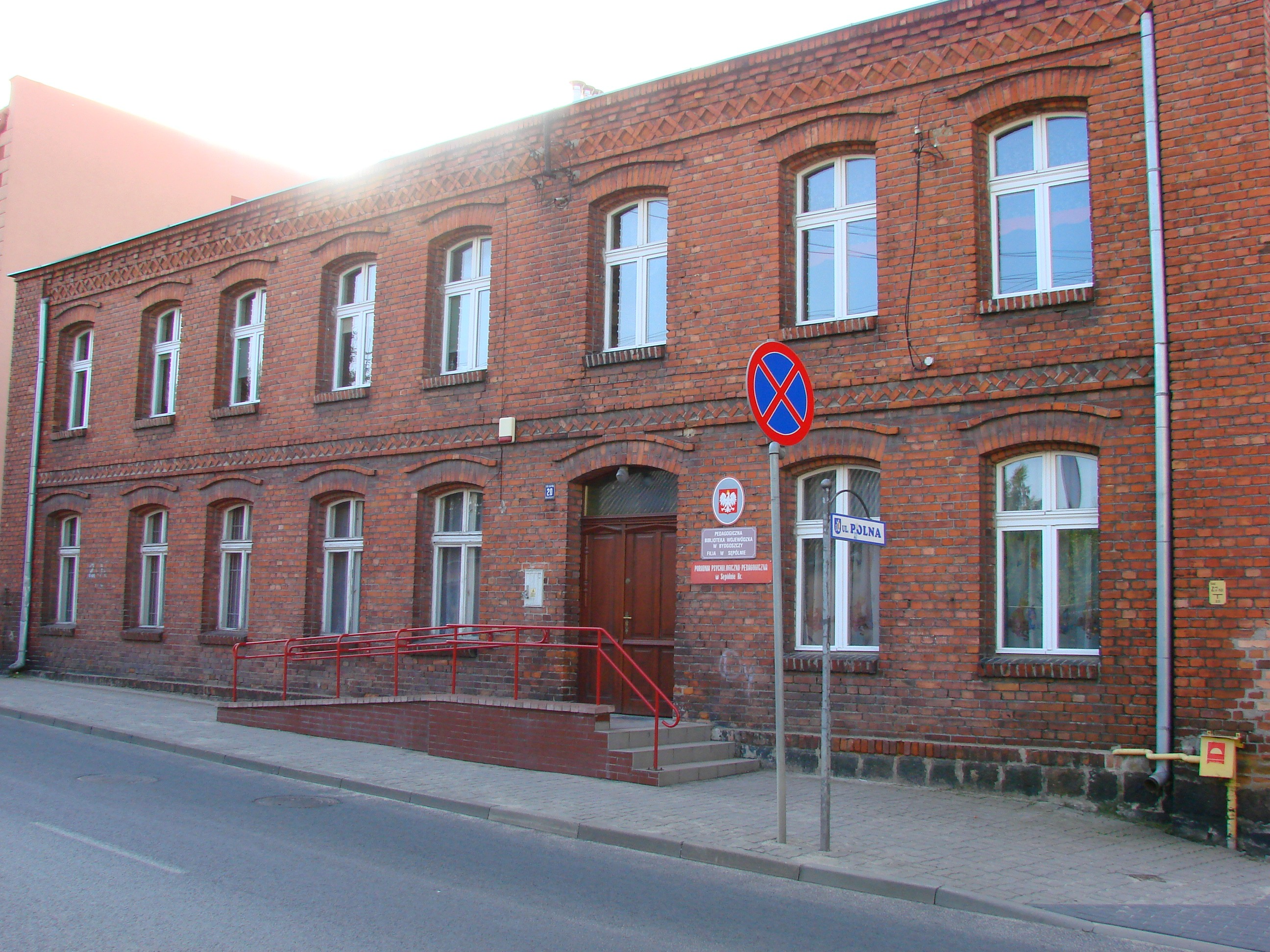 Budynek Biblioteki Pedagogicznej; Poradnia Psychologiczno-Pedagogiczna, przy ul. Wojska Polskiego. Obiect in Sępólno Krajeńskie, Poland.